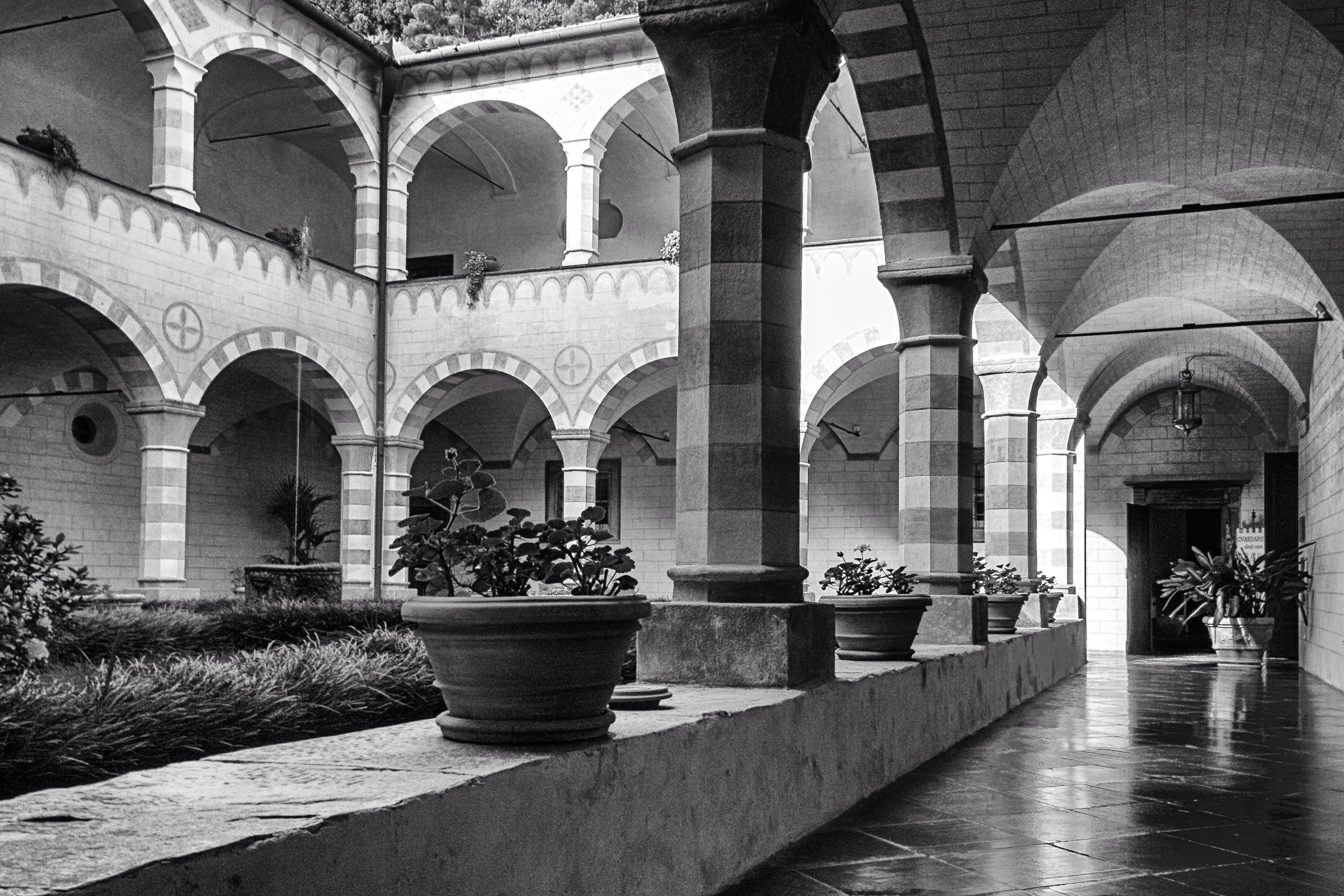 La Cervara - Abbazia di San Girolamo al Monte di Portofino Bellissima abbazia con giardino affacciata sul Mar Ligure This is a photo of a monument which is part of cultural heritage of Italy.